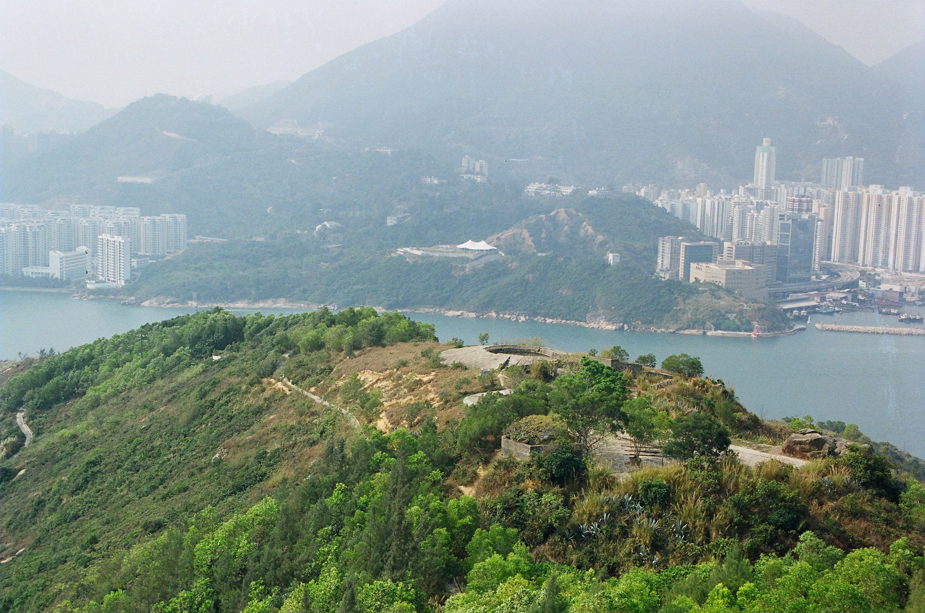 魔鬼山歌賦炮台